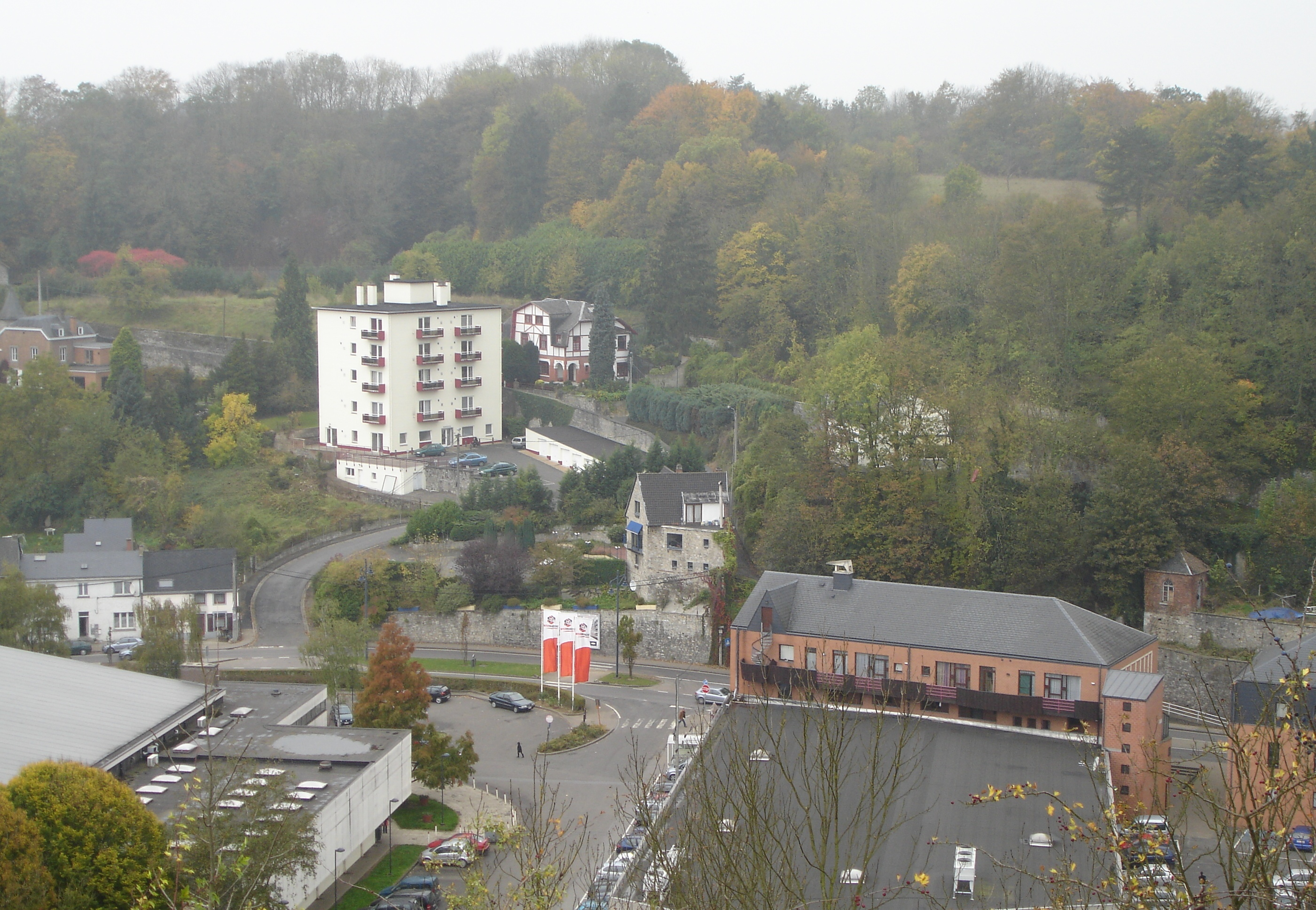 Walon: Li mitan do viyaedje di Sint-Serwai-dlé-Nameur. Ons î voet li såle des sports (eyou k' i gn aveut l' gåre dins l' timp), li biblioteke.